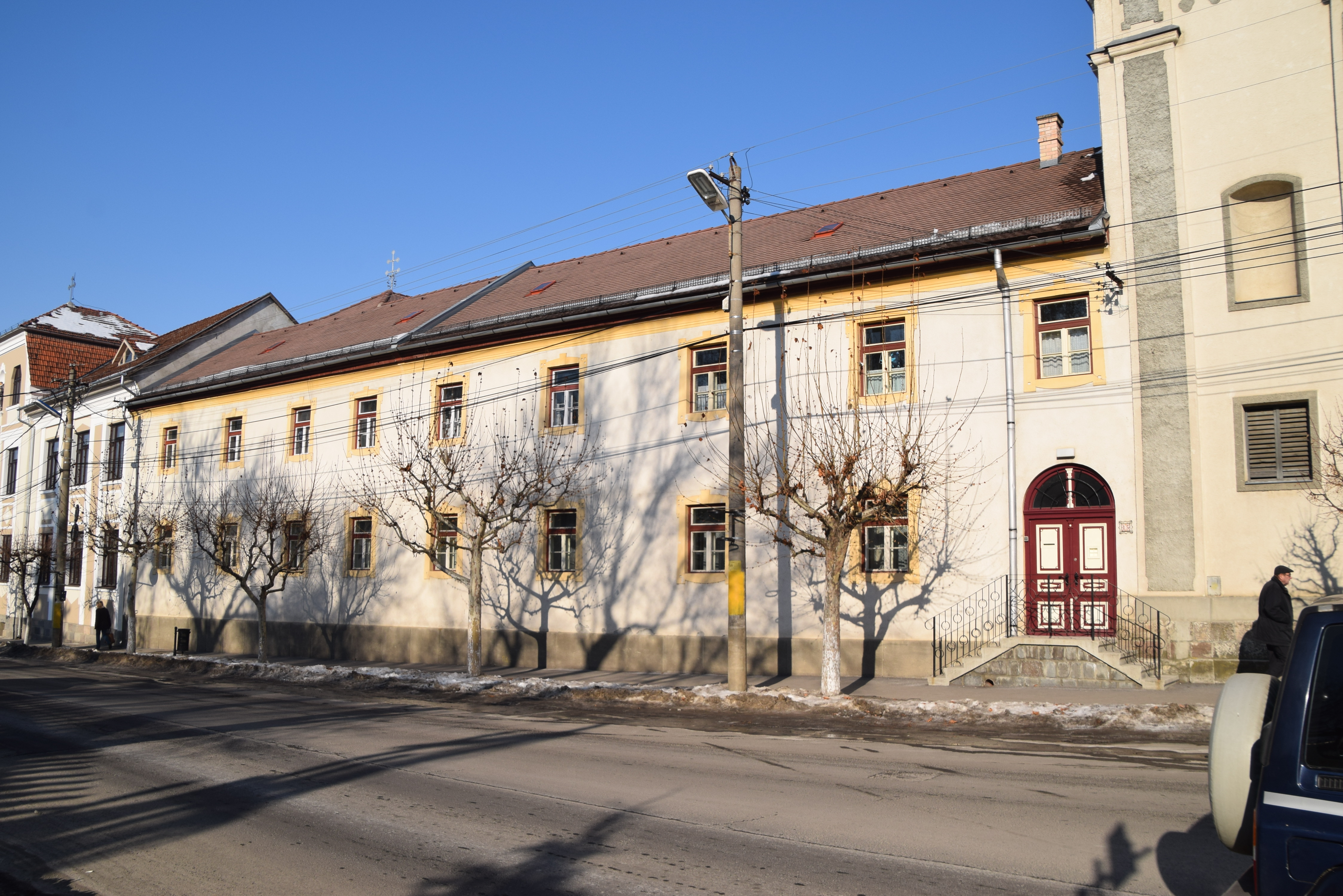 Claustru 02